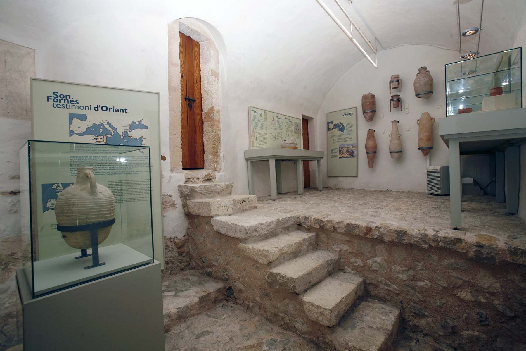 Sala amb materials clàssics trobats a Son Fornés